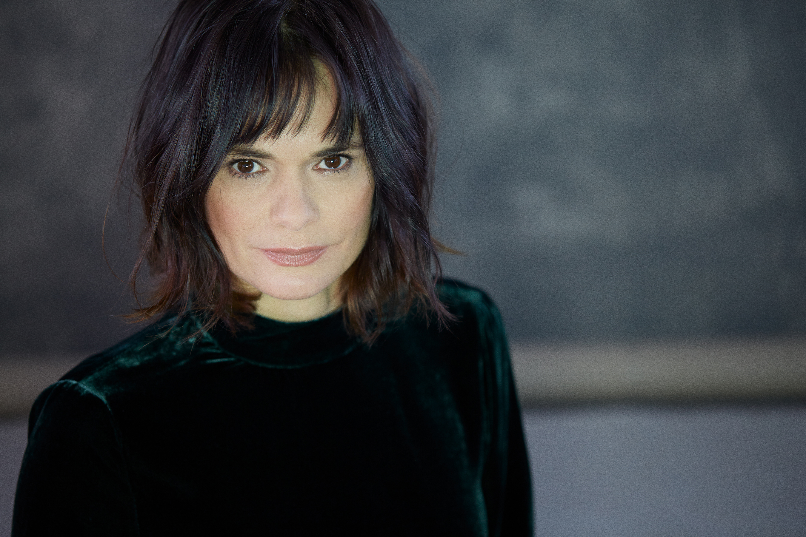 Skådespelaren Daniela Svensson, 2016.